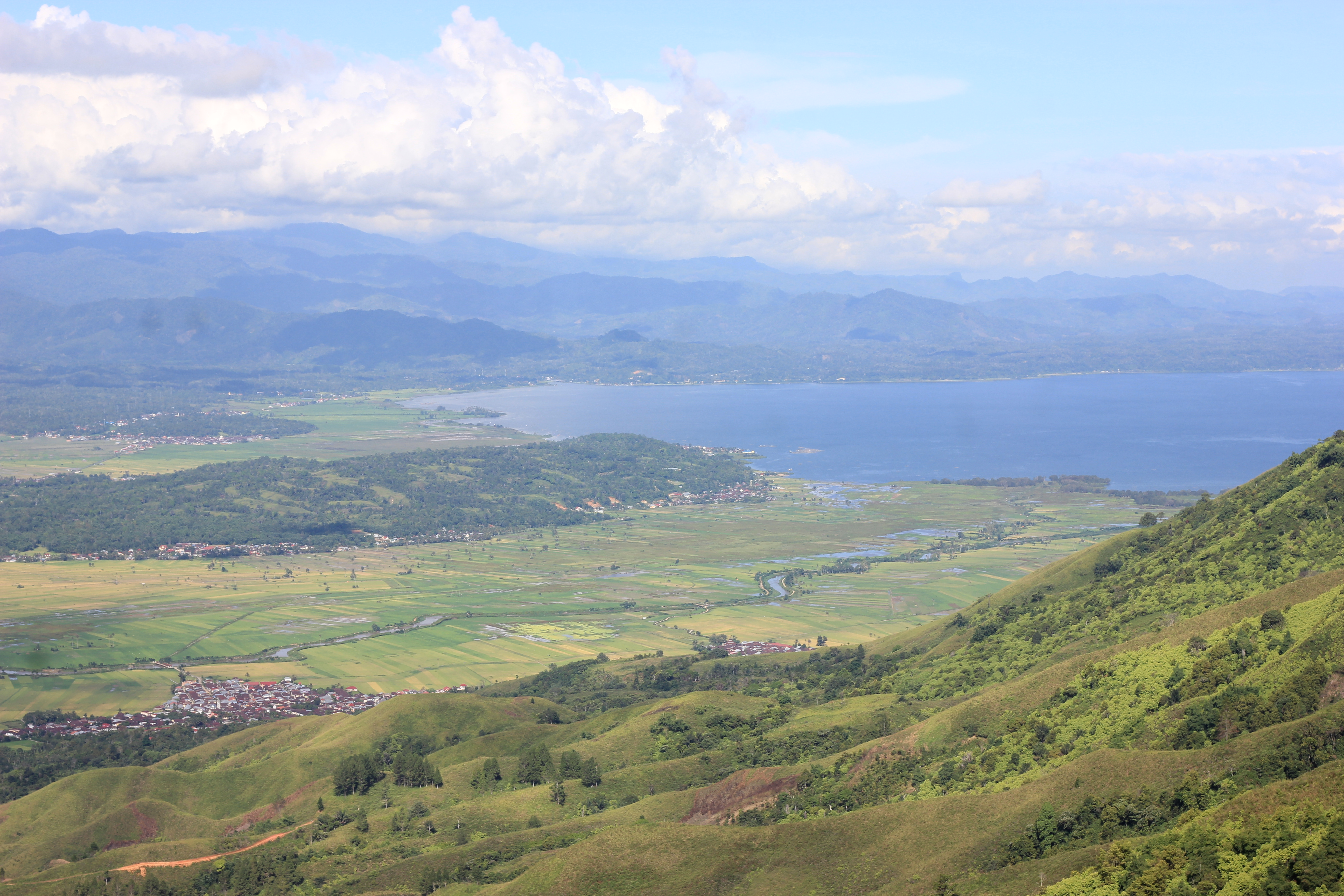 Pemandangan Danau Kerinci dan Sawah dari Bukit Kayangan Kota Sungai Penuh, Provinsi Jambi